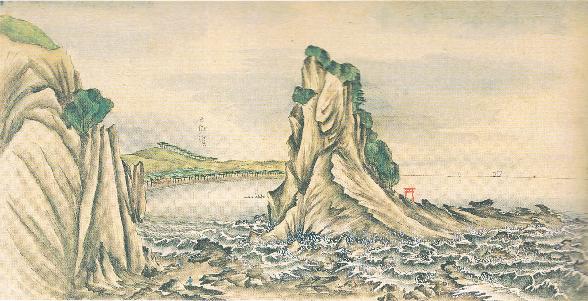 僧白雲筆 磐城紀行図巻 全13図のうち波立弁天巌 絹本着色 神戸市立博物館蔵